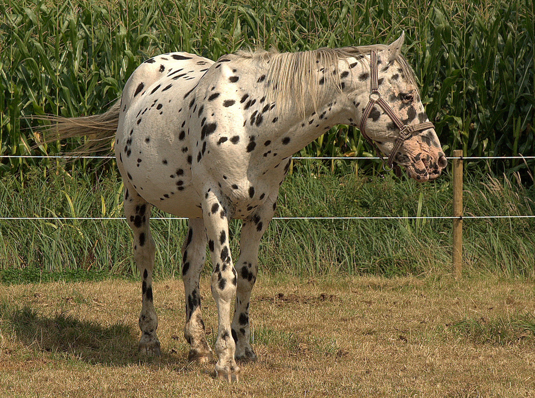 Knabstrupper in Poesele, België